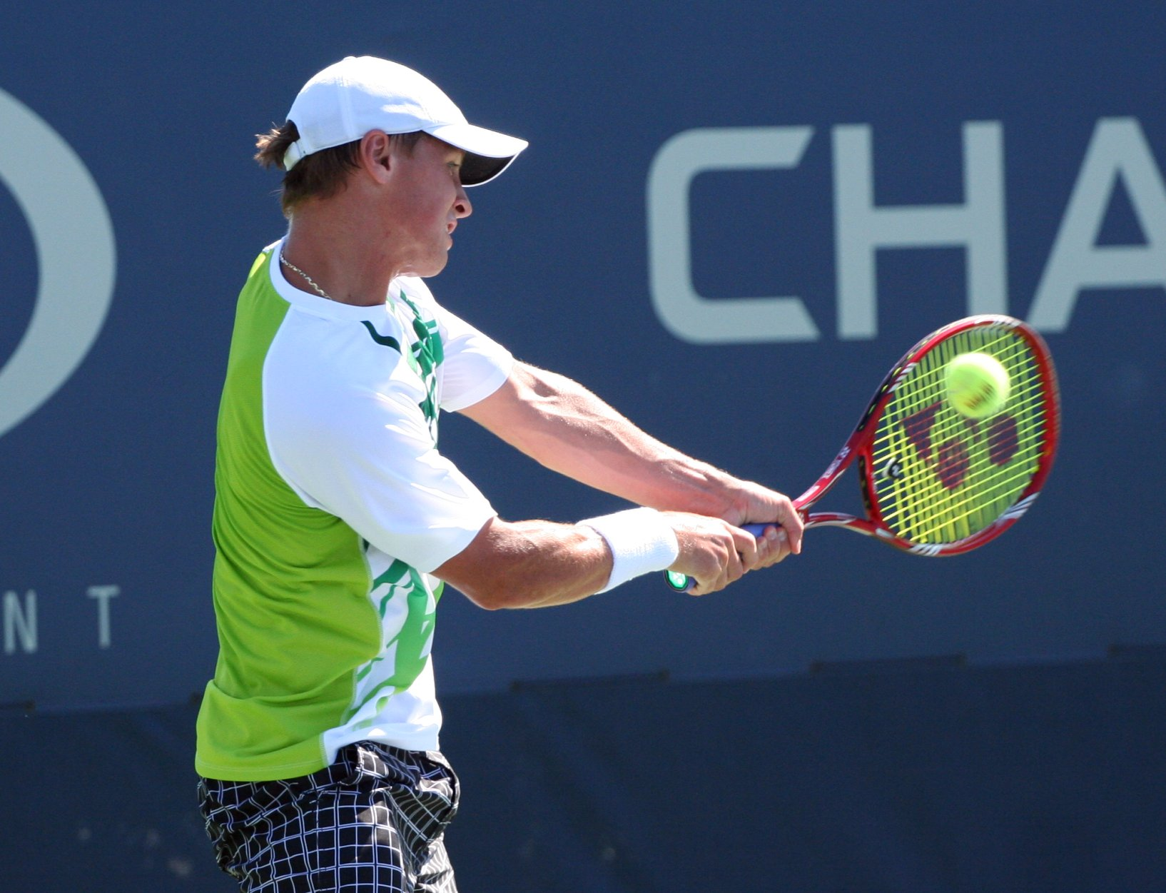 U.S. Open Aug. 30, 2010